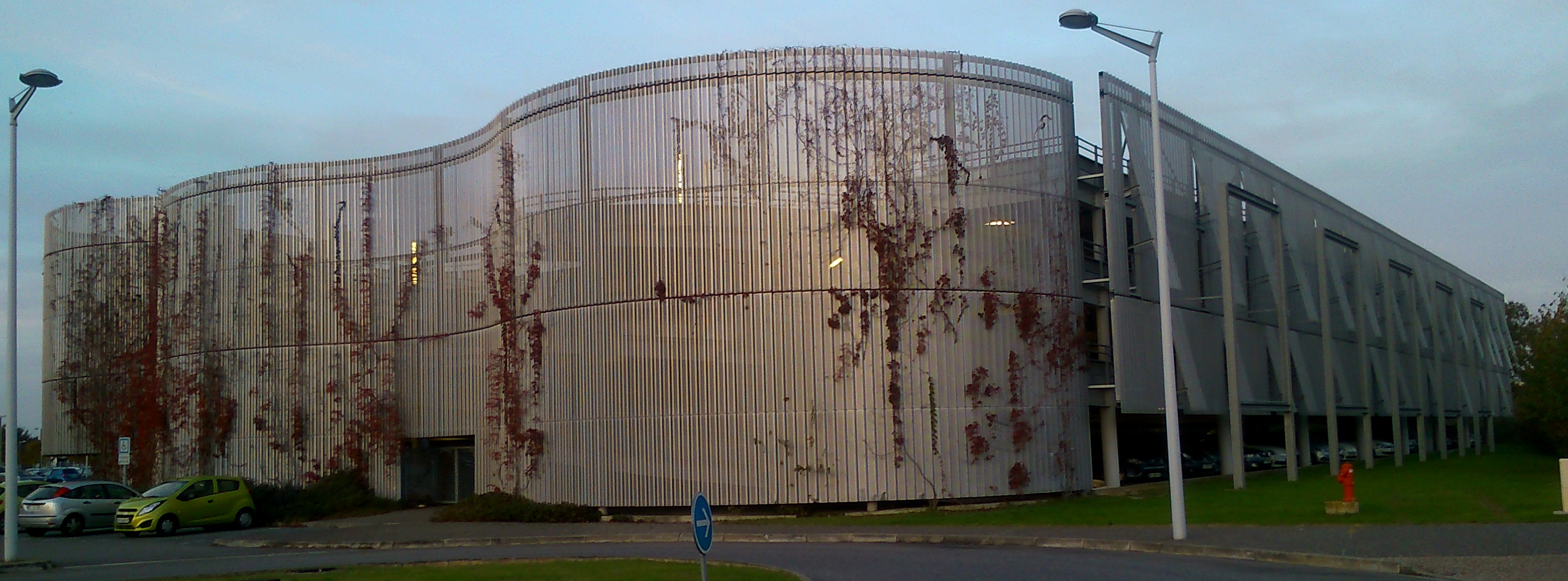 Parc relais de la station de métro Argoulets à Toulouse